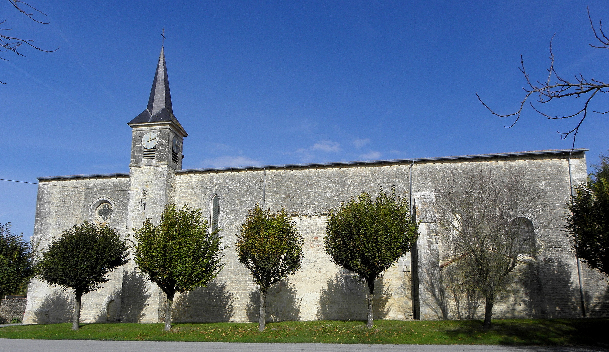 Église Saint-Pierre de Landes (17). Vue méridionale.